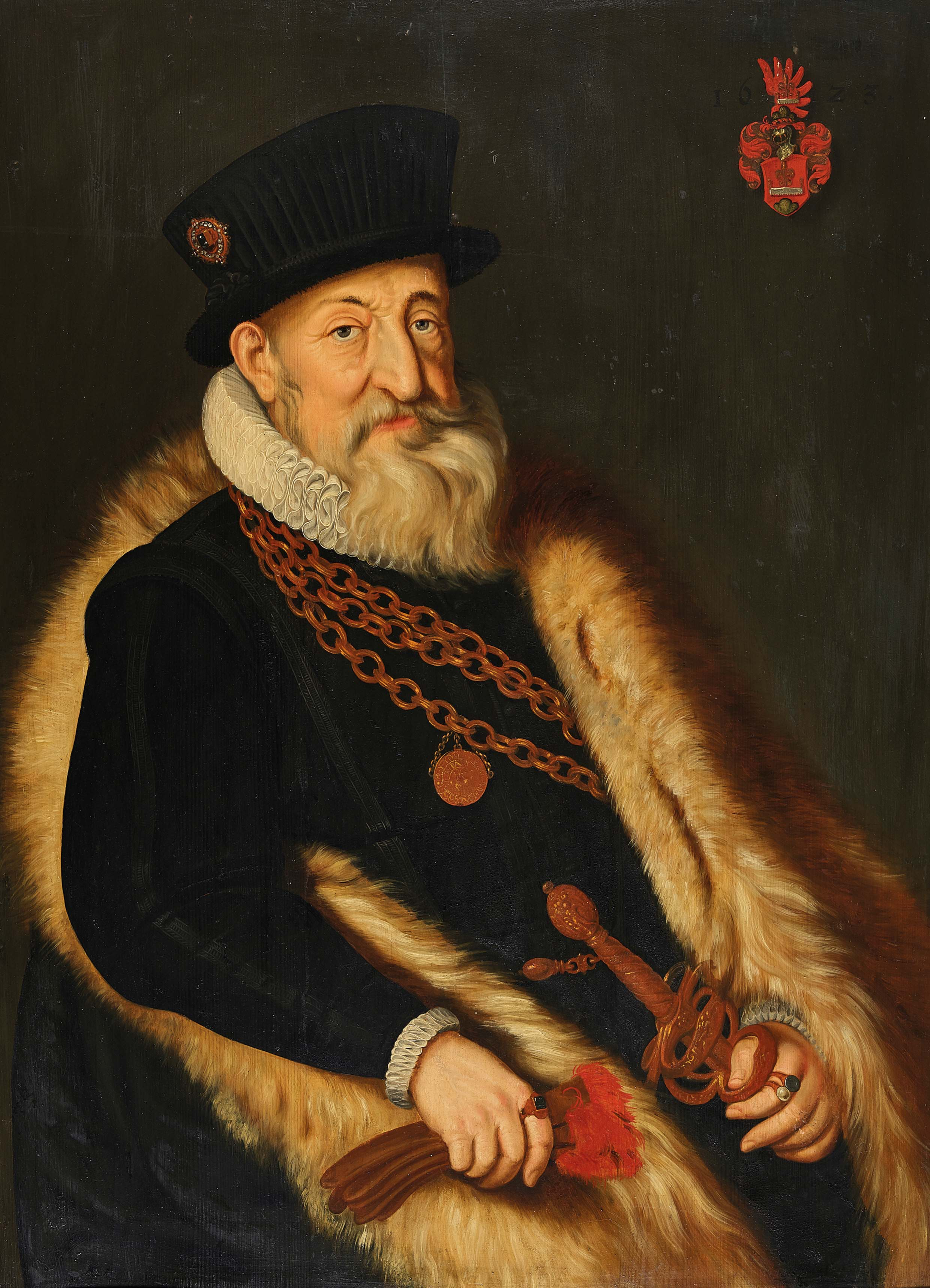 Hans Rudolf Sager, Venner zu Schmieden, 1573-1579 Schultheiss von Bern